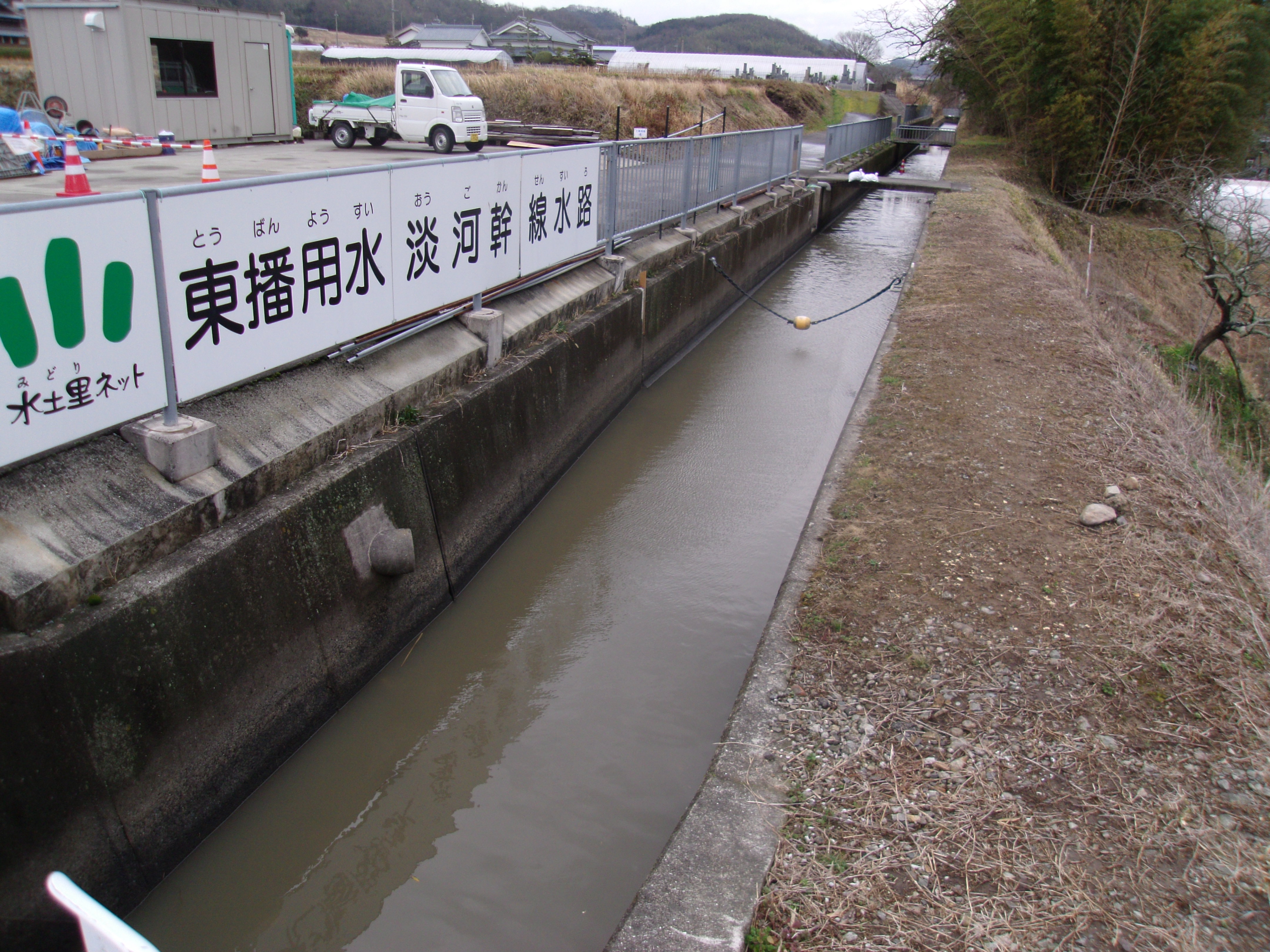 神戸市北区淡河町を流れる淡河疎水。現在は東播用水事業に組み込まれている。